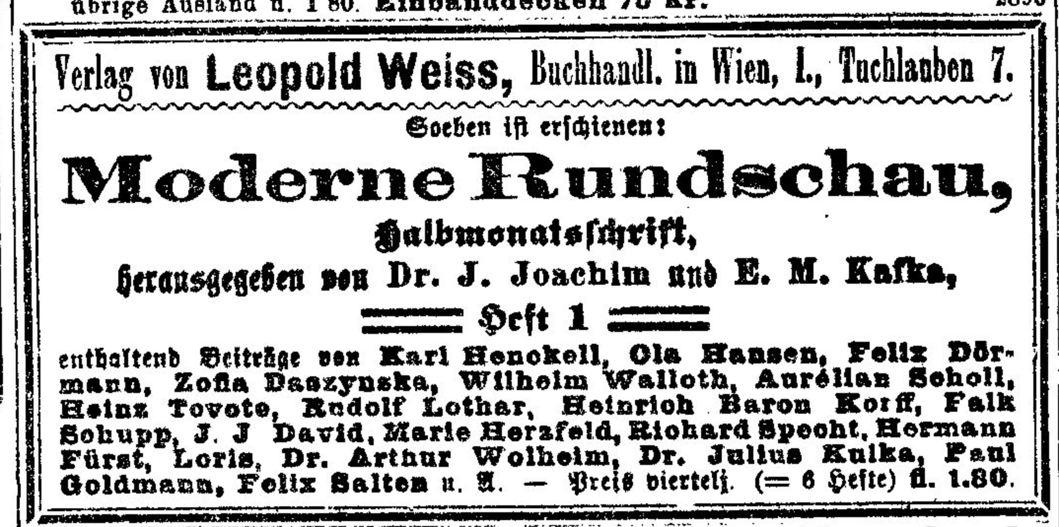 In: Neue Freie Presse, 29. 3. 1891, S. 14